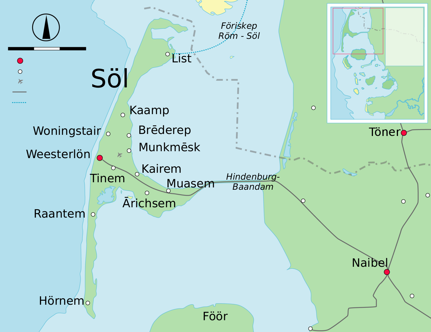 Sylt: nordfriesische Variante der von Begw erstellten Karte